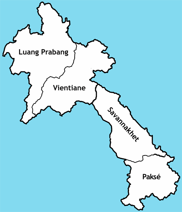 Mappa dei vicariati apostolici del Laos. Lavoro personale. Categoria:Chiesa cattolica in Laos